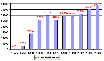 Poblacion de Tomelloso (1575-2009).